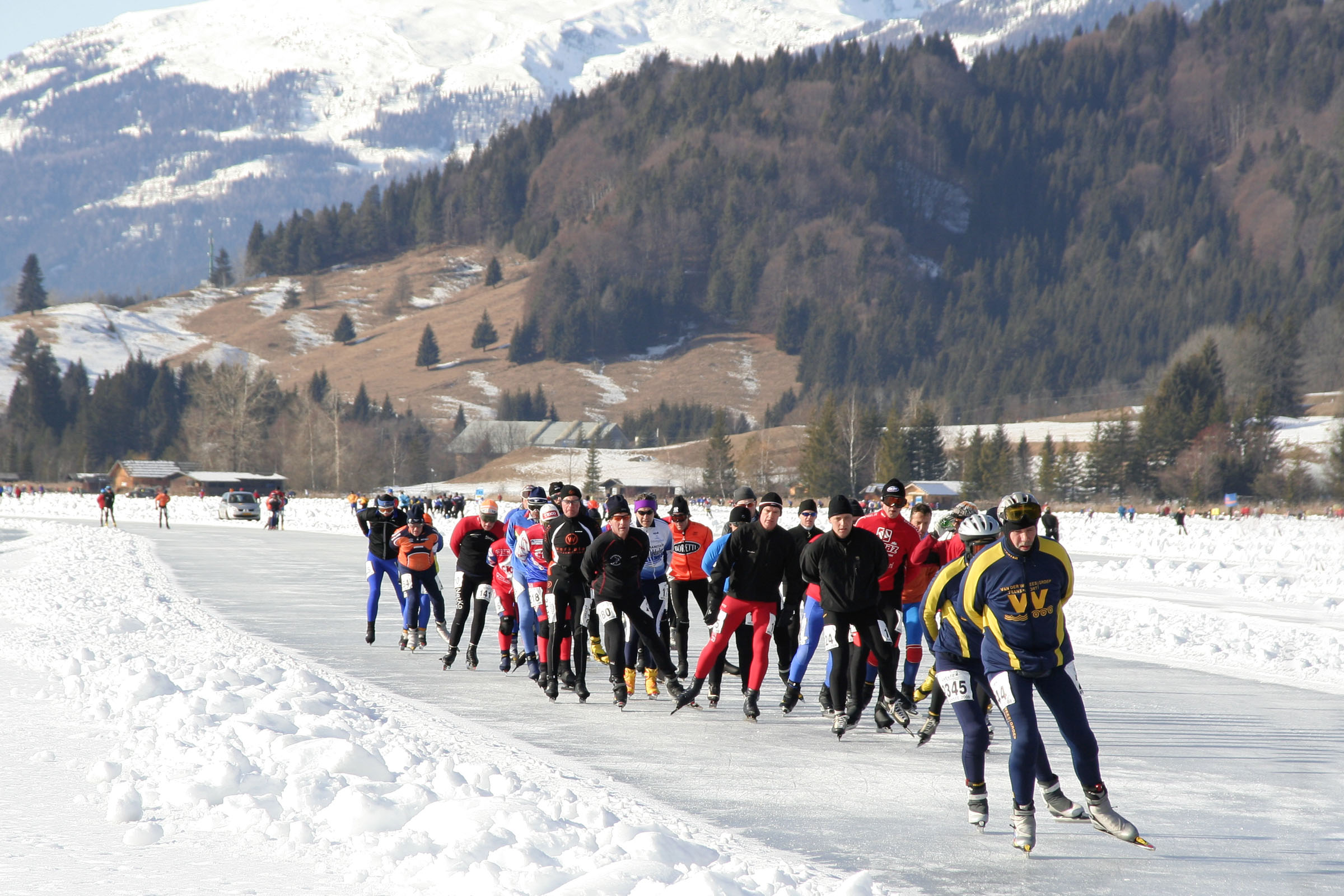 Altes Bild von der 11-City Tour Weissensee. Gruppe holländischer Eischschnellläufer am oberen Teil des Sees. Im Hintergrund die Kreuzeckgruppe.